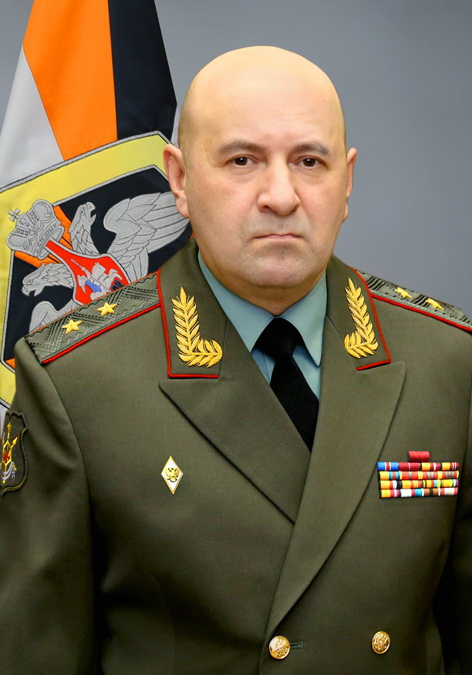 Начальник войск радиационной, химической и биологической защиты ВС РФ генерал-лейтенант Кириллов Игорь Анатольевич